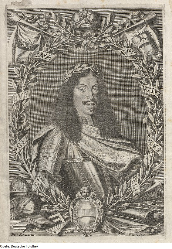 Original image description from the Deutsche FotothekPorträt & Kaiser